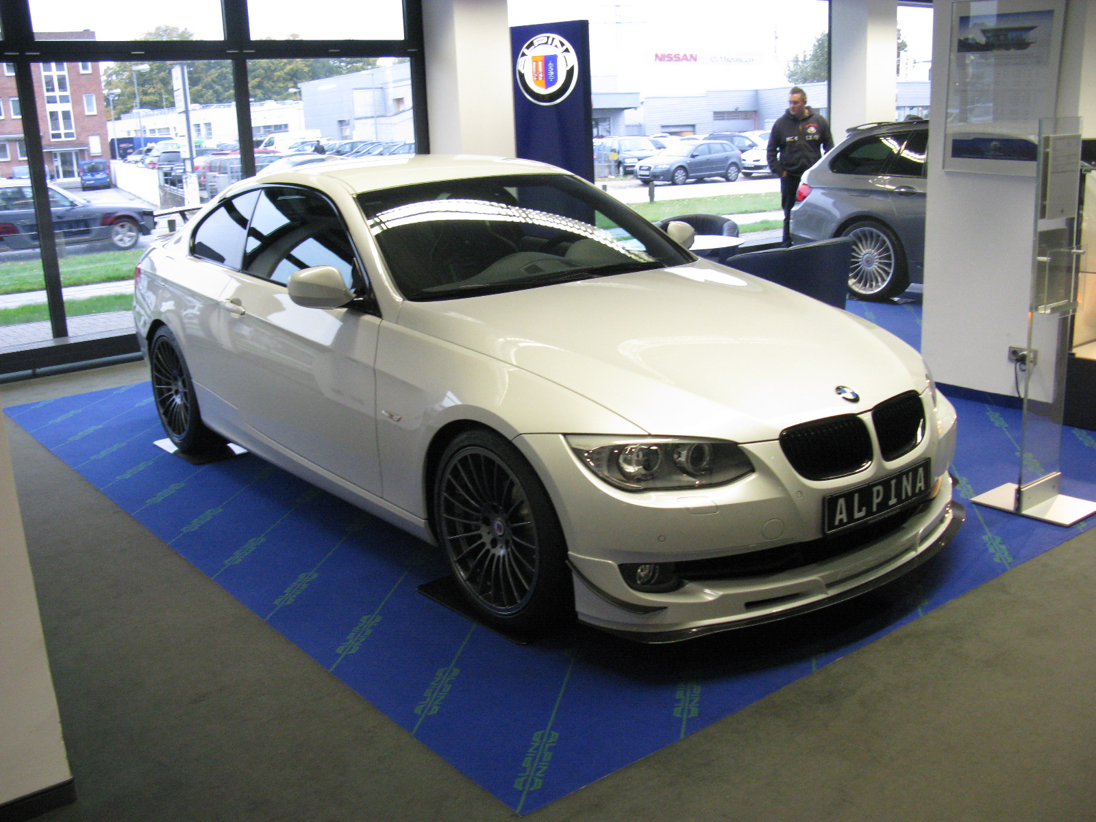 BMW Alpina B3 GT3